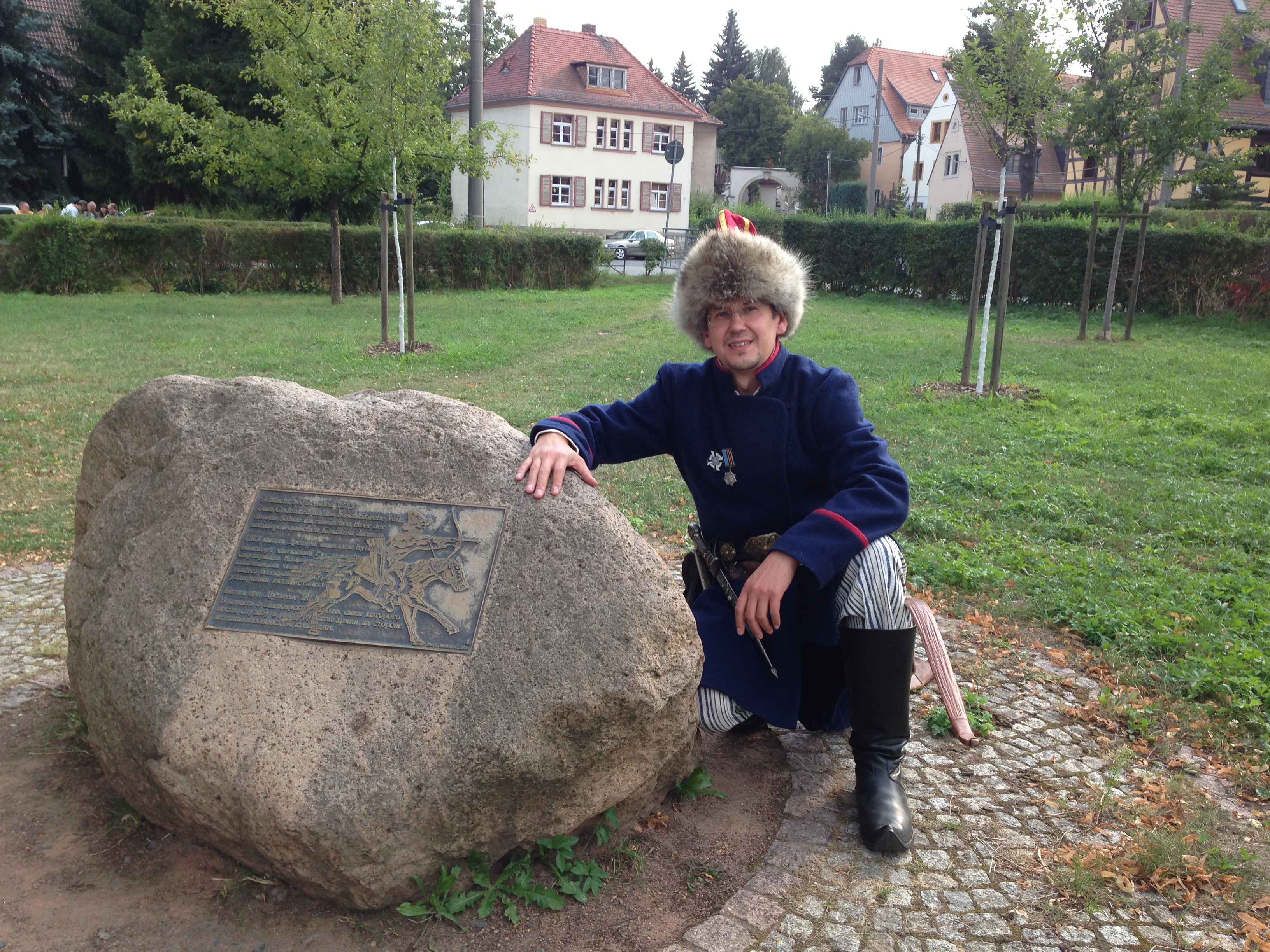 Битва при Дрездене 1813 года. Памятник башкирским воинам, участникам Отечественной войны 1812 года. Из архива РОО ВИК "1-й башкирский конный полк - "Любизар" Республики Башкортостан.